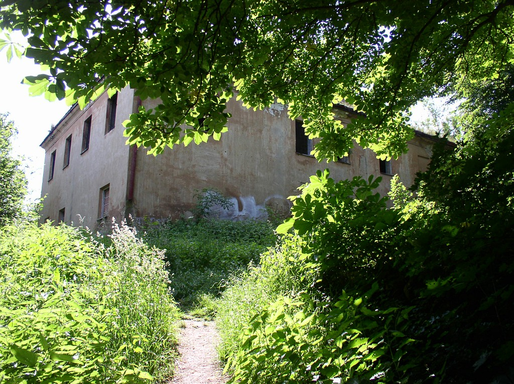 Usedlost Skalka v Praze na Smíchově – pohled ze zpustlé zahrady